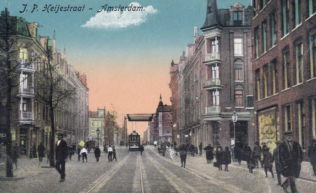 Jan Pieter Heijestraat met tram(ansichtkaart, kleur) ~1905.